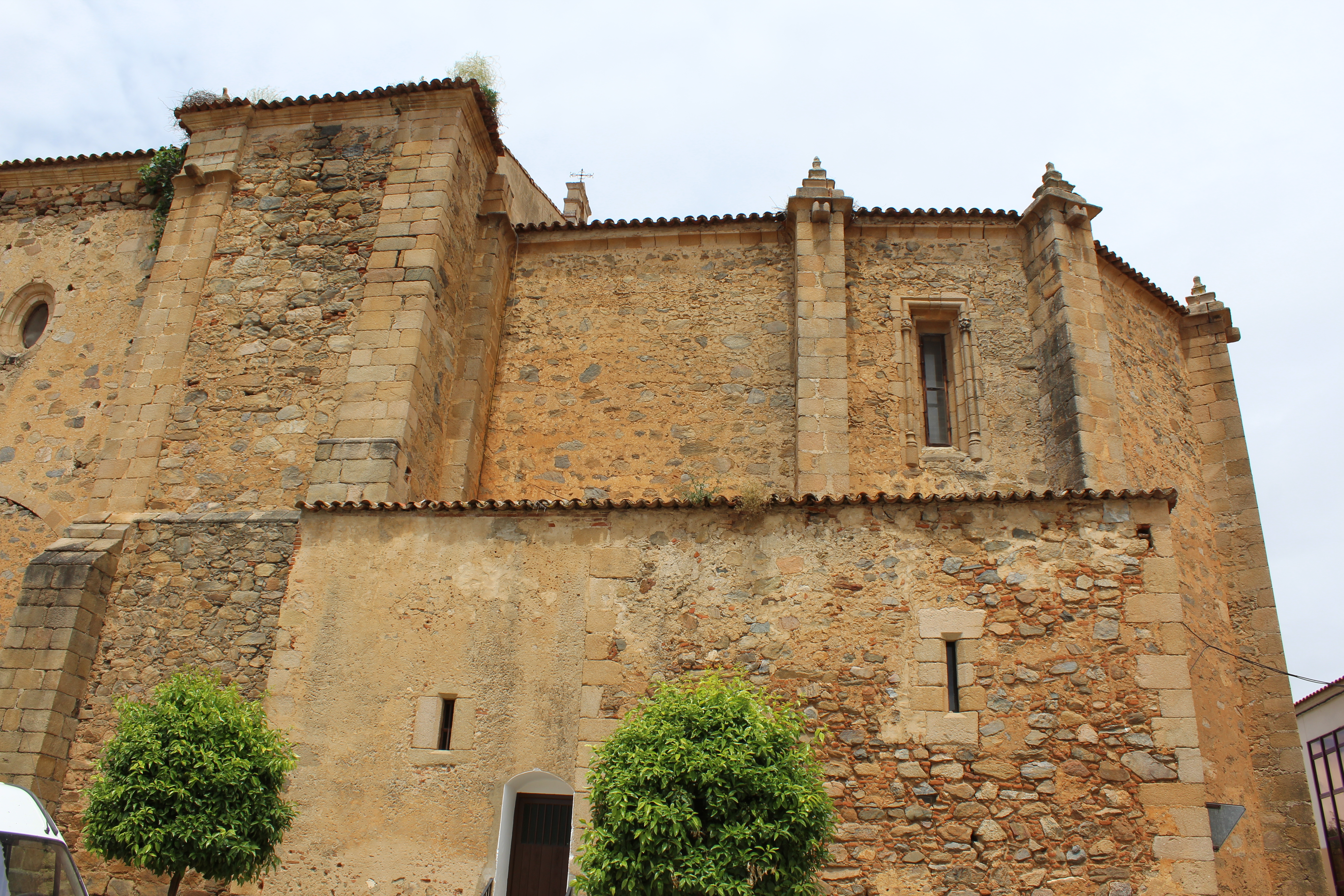 Ábside de la iglesia parroquial de Santa Marina